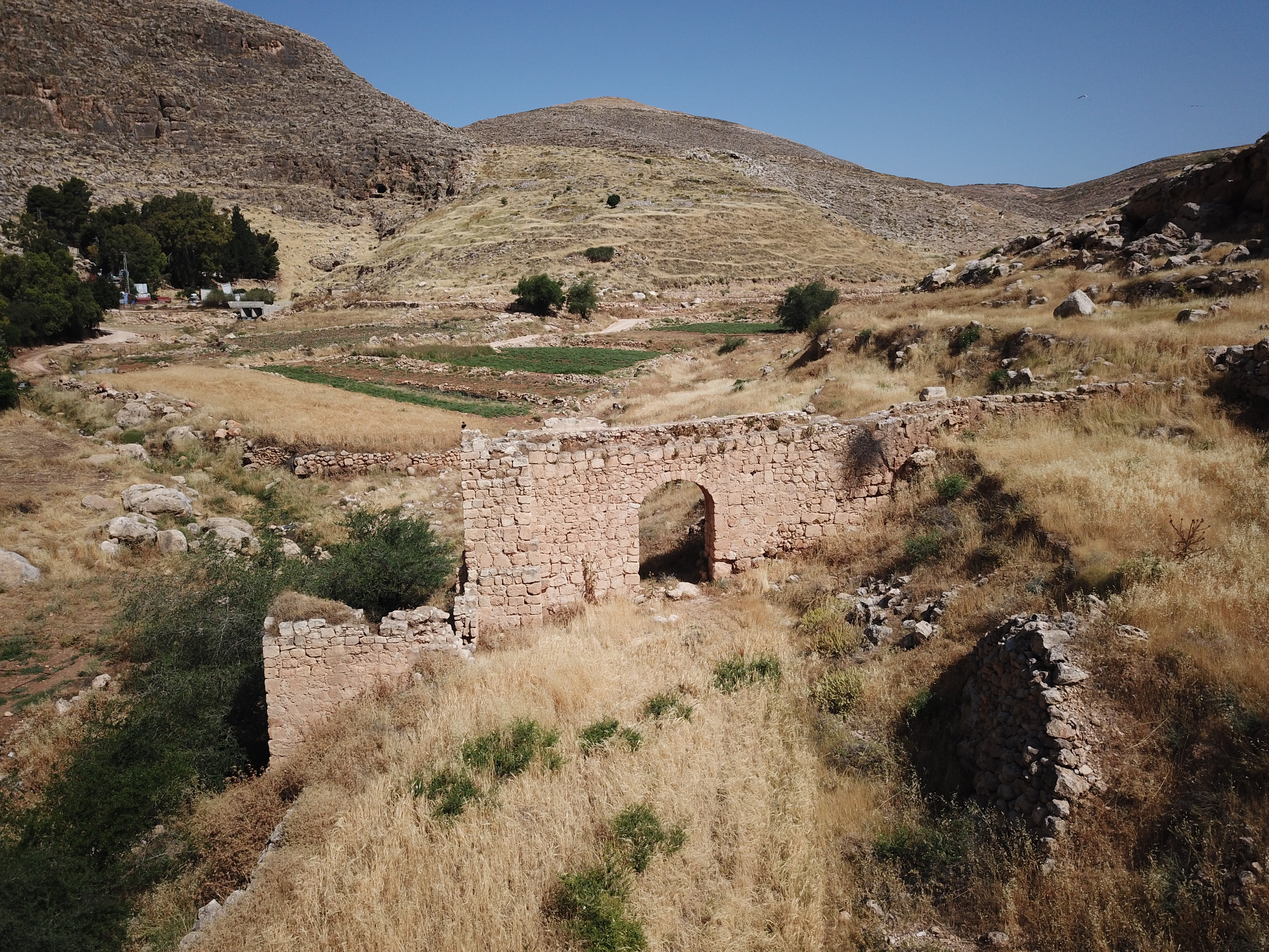 מוביל המים לתחנת הקמח בעין סמיה